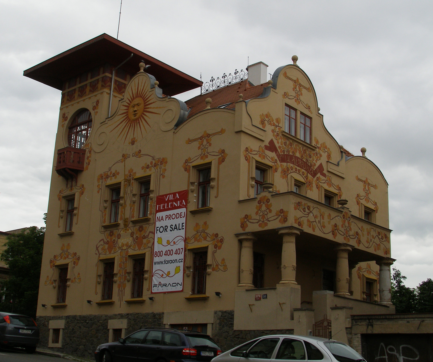 Vila Helenka, Praha 5-Smíchov, Na Václavce 1078/30